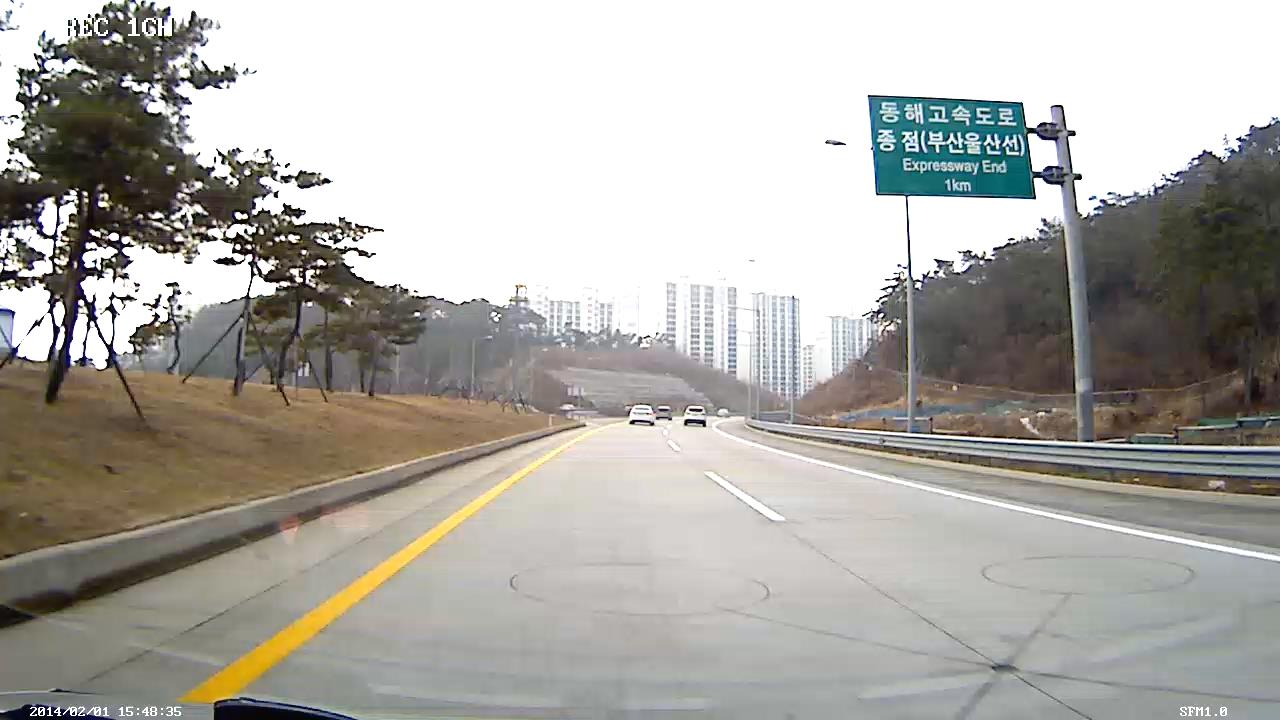 동해고속도로 시점 1km 전 장산로 방향입니다.